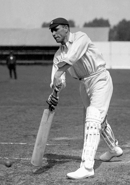 Leonard James Moon, Middlesex, circa 1905.